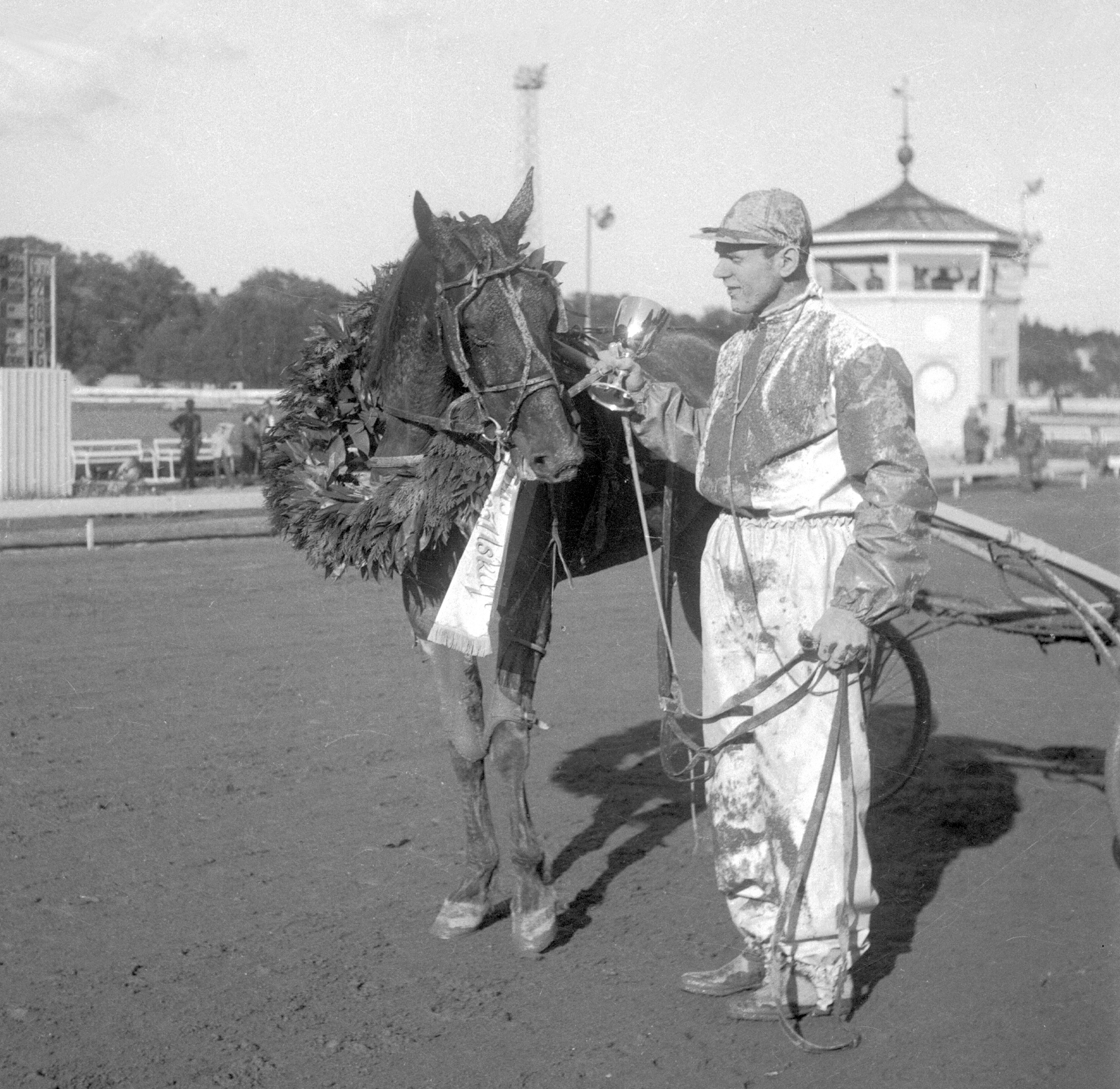 Sören Nordin med Frances Bulwark efter vinsten i Elitloppet 1953 på Solvalla.